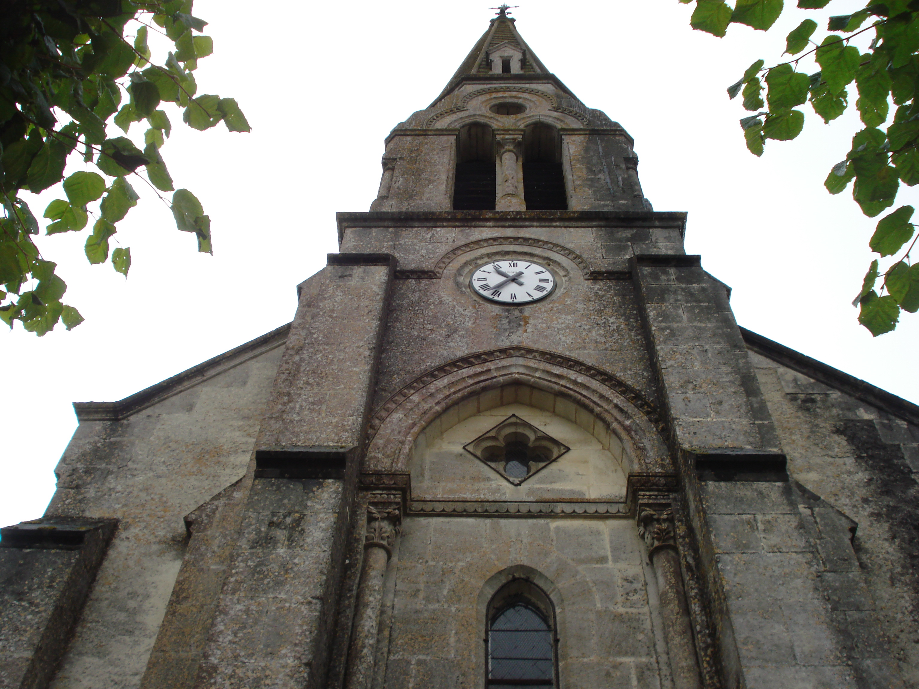 L'église de La Villedieu (Charente-Maritime)